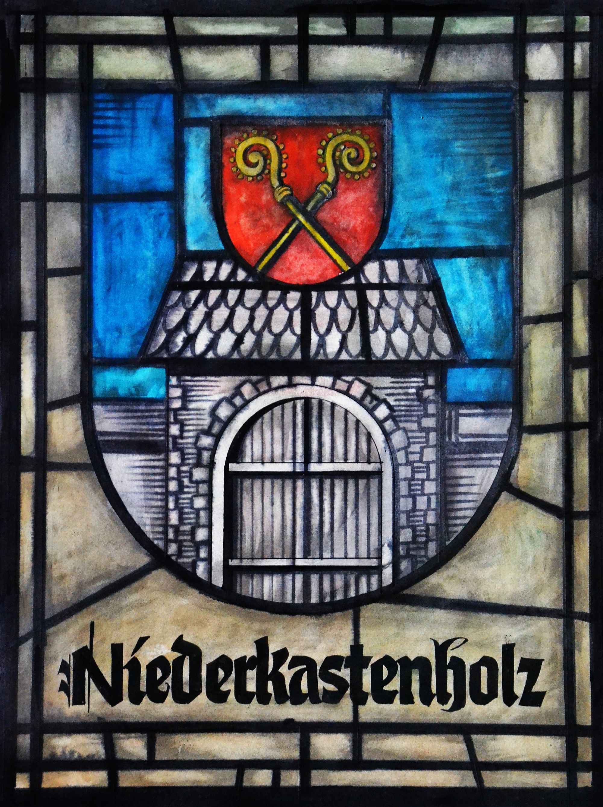 Wappen von Niederkastenholz